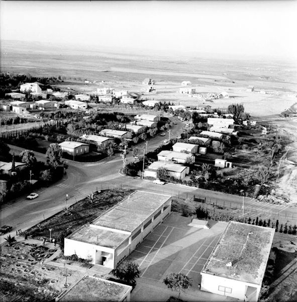 היישוב עומר בשנת 1974